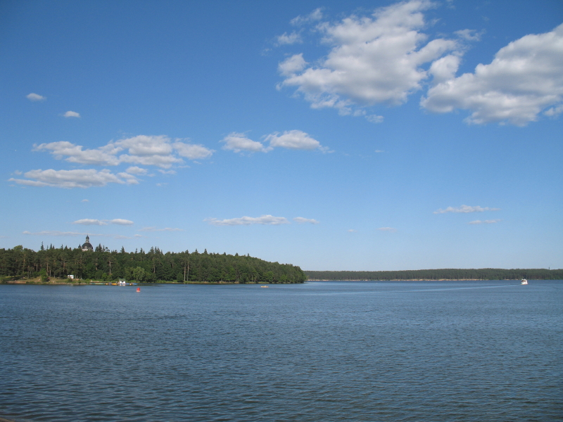 Kauno marios, Pažaislio bažnyčios bokštas.